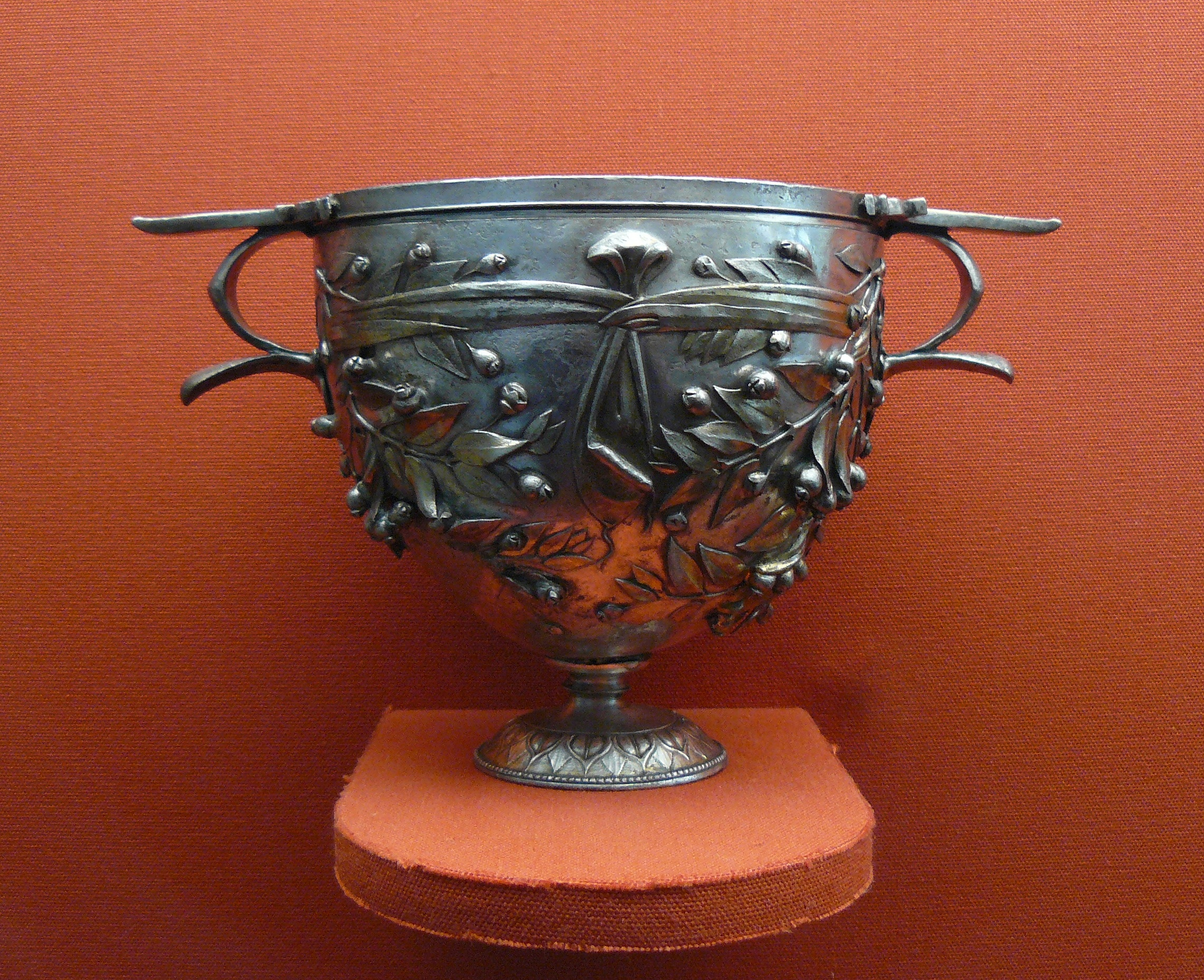 Canthare (vase à boire) - Alise-Sainte-Reine, Côte d'Or, France - Ier siècle av. J.C. - argent env; 10 cm. - trouvé en 1862 - M.A.N. St-Germain-en-Laye - Inv. n° 7564